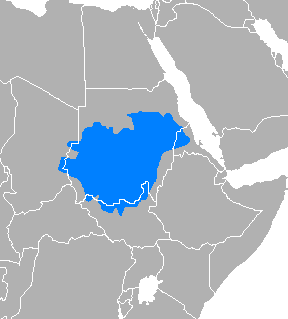 Árabe sudanés